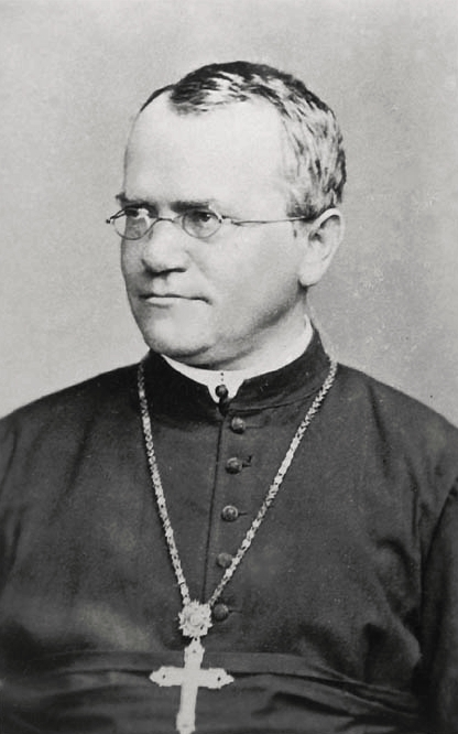 Gregor Mendel s křížem.